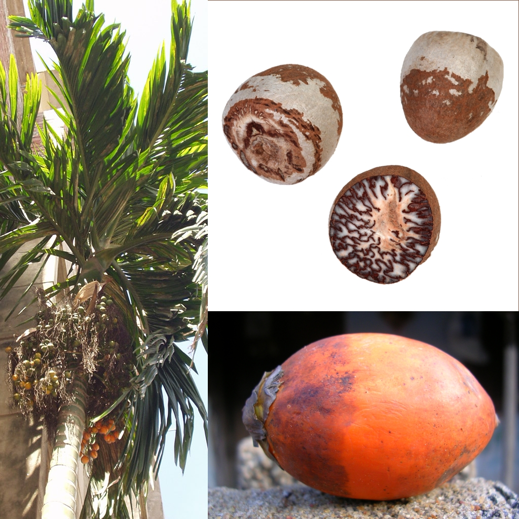 Grafika podręcznika Wikijunior:Owoce. Orzech arekowy, pinang (niejadalny, żuty); areka katechu (Areca catechu).